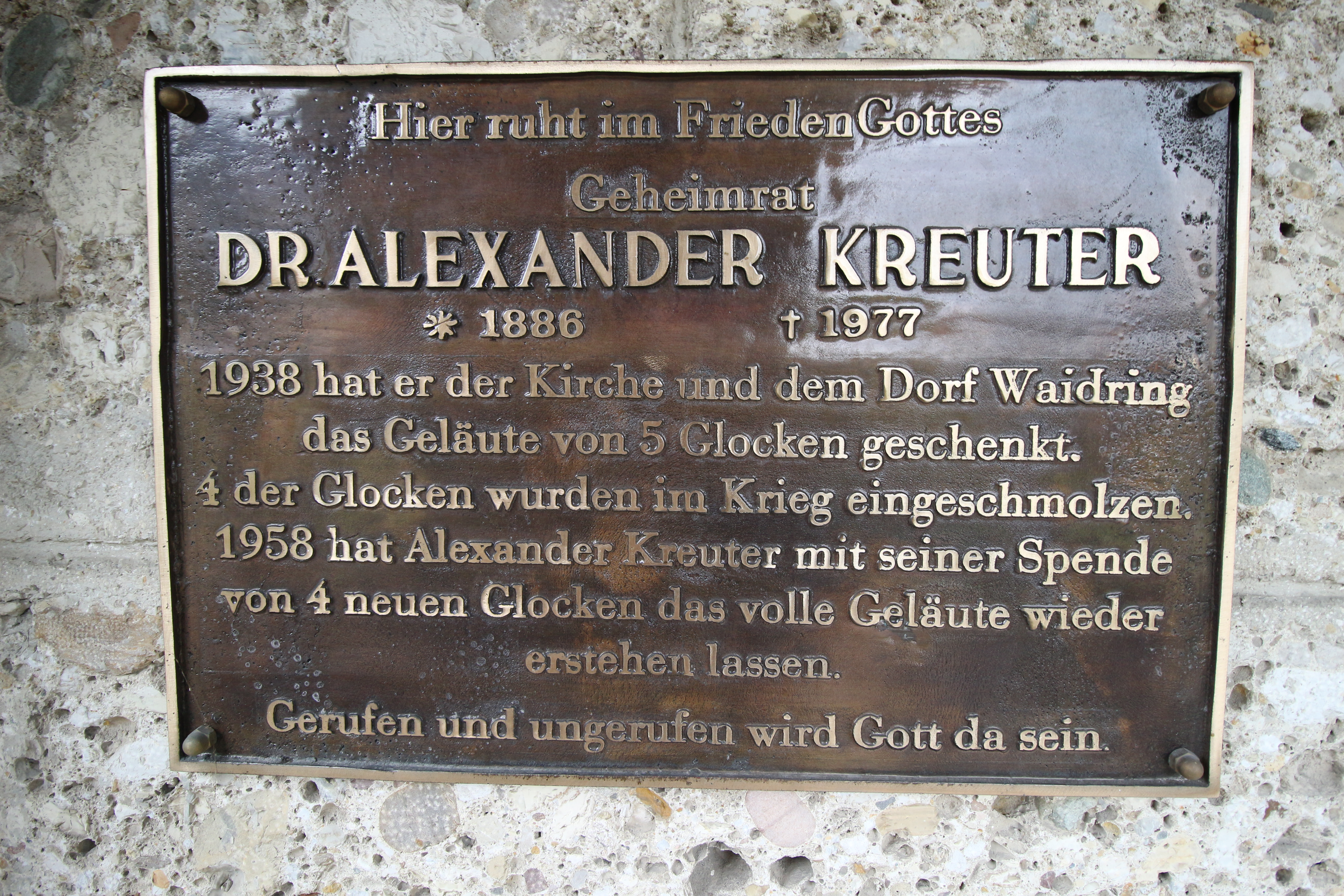 Plakette, die an Alexander Kreuter erinnert, angebracht an der ehem. Totenkapelle in Waidring, Tirol.